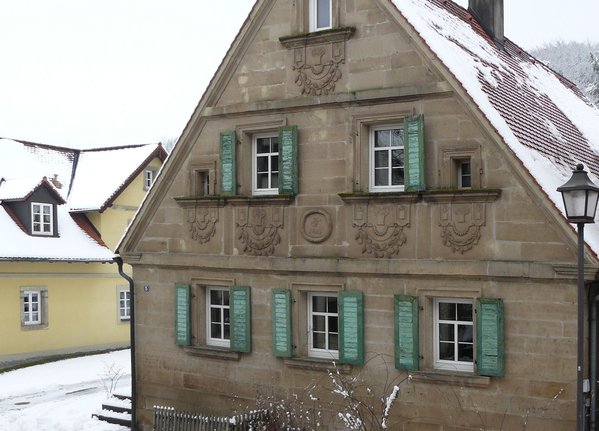 Bauernhaus in Heßlach